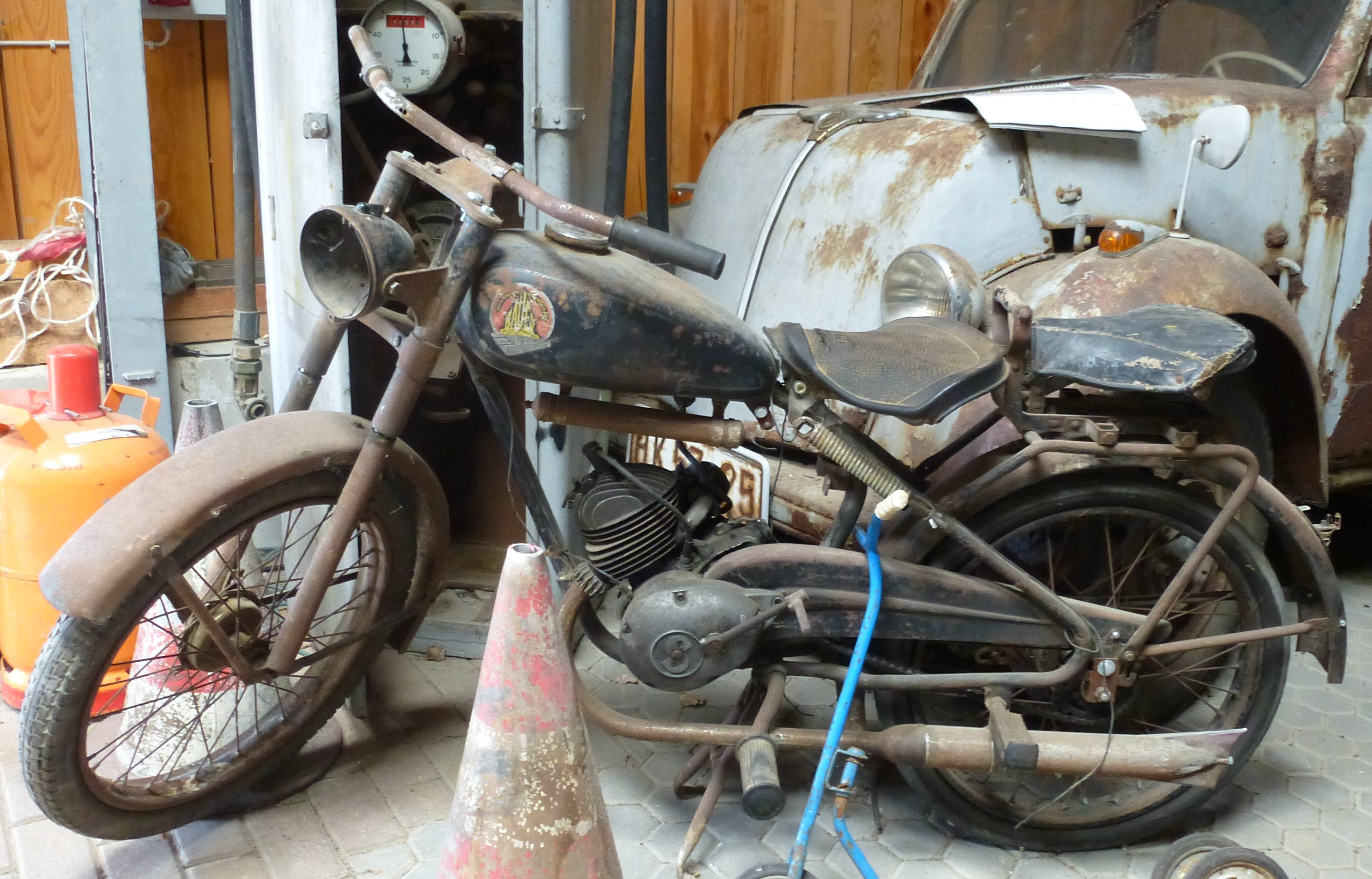 Bauer Motorrad 1951